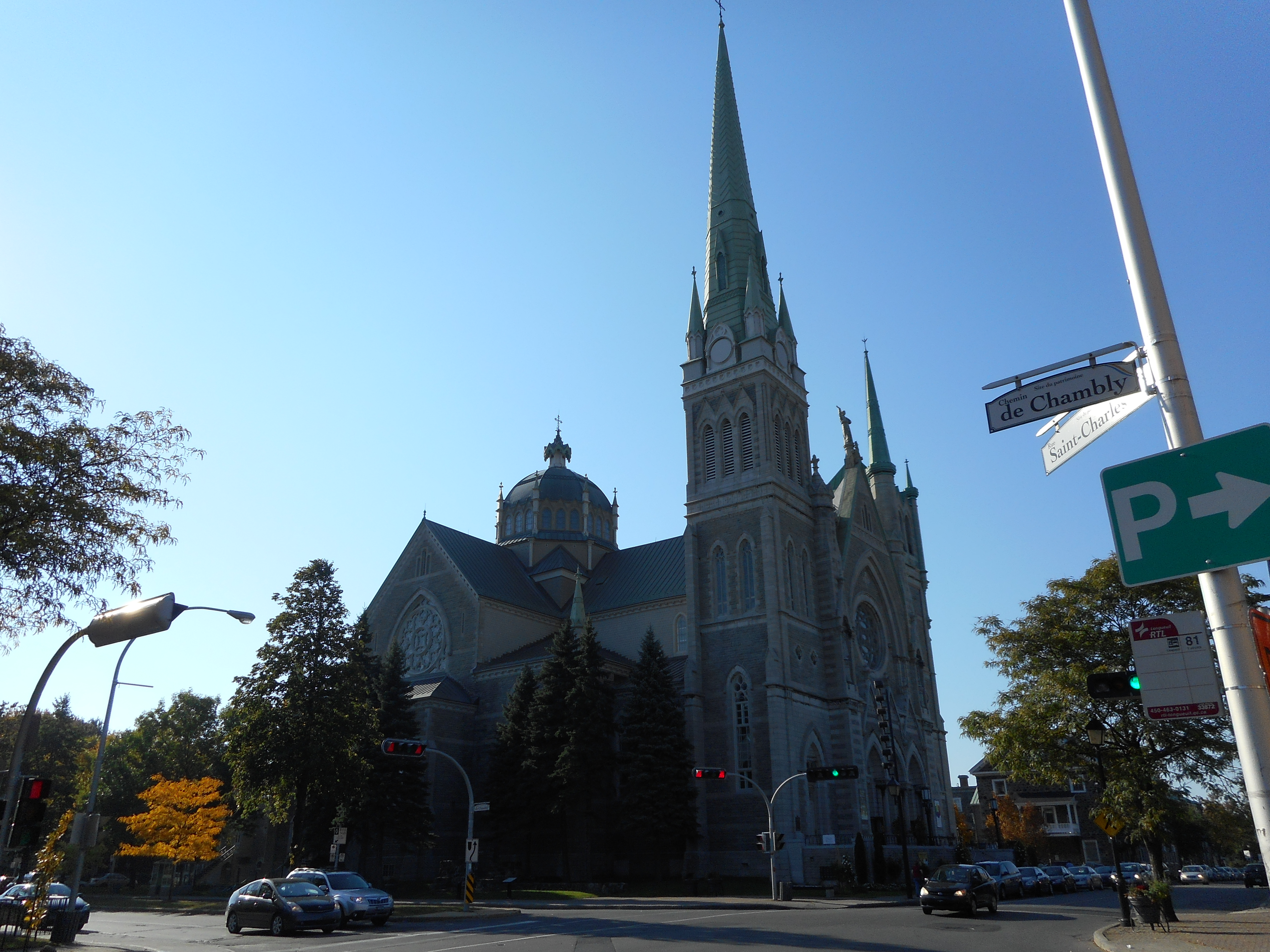 Cocathédrale Saint-Antoine-de-Padoue, rue Saint-Charles, Longueuil, Québec